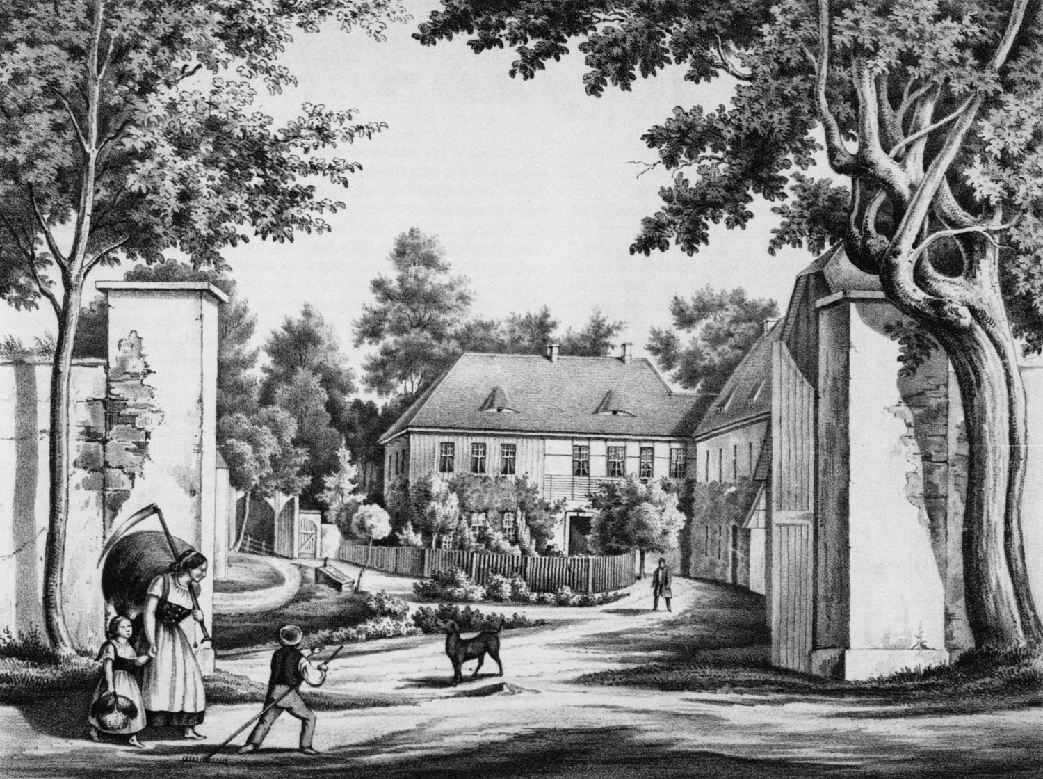 Das Rittergut Piskowitz im 19. Jahrhundert